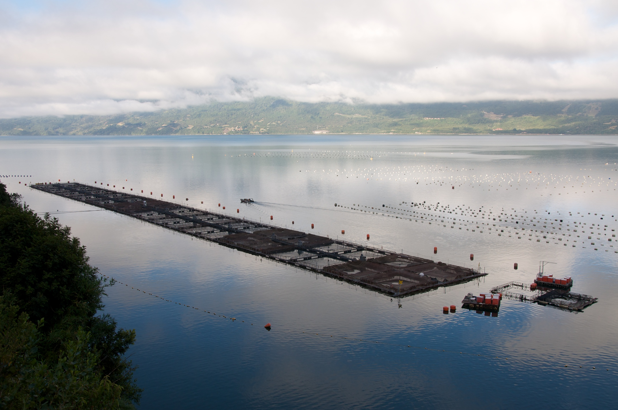 Farmed salmon net pens